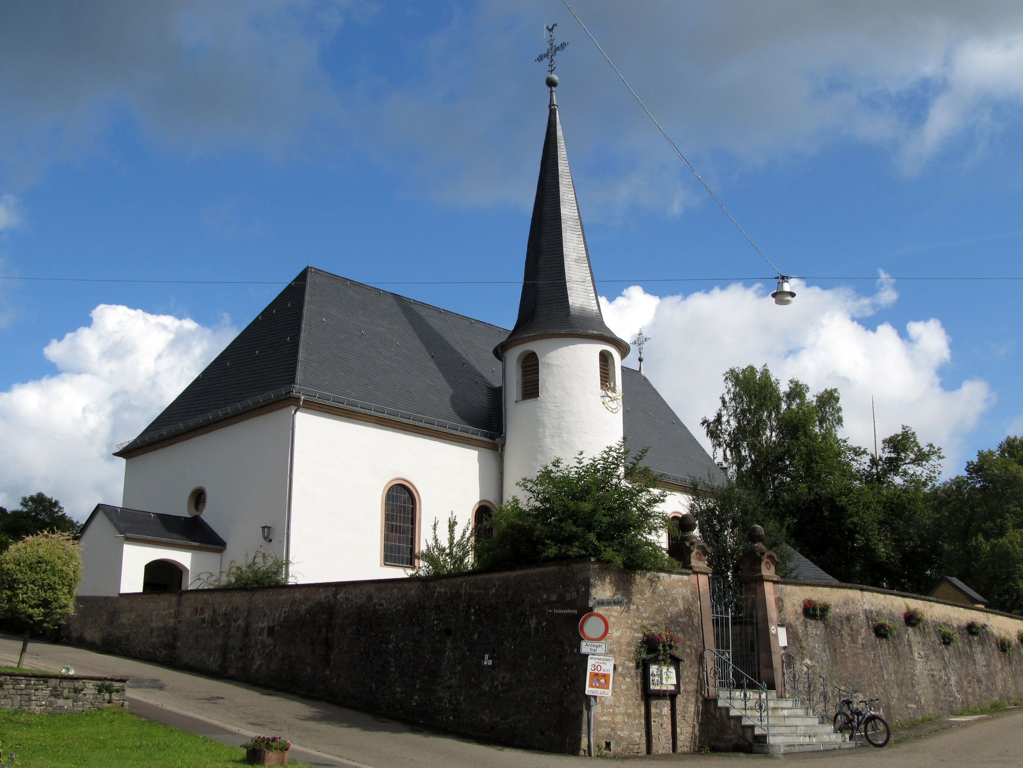 Die katholische Pfarrkirche St. Margaretha in Bebelsheim, Gemeinde Mandelbachtal, Saarland